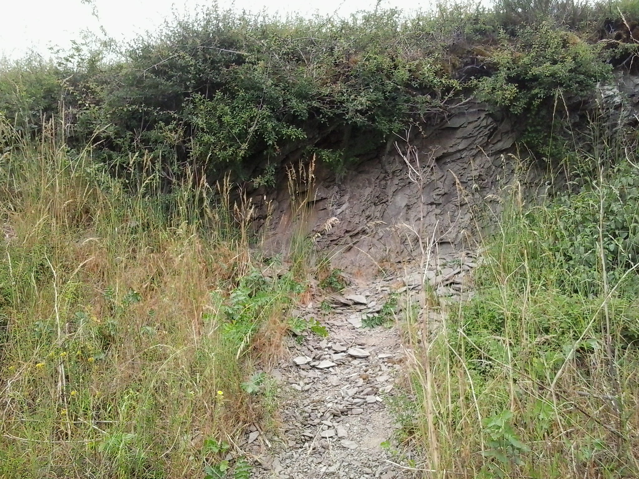 La réserve naturelle nationale de Vireux-Molhain (RNN104) est une réserve naturelle nationale dont l'intérêt est géologique et paléontologique.